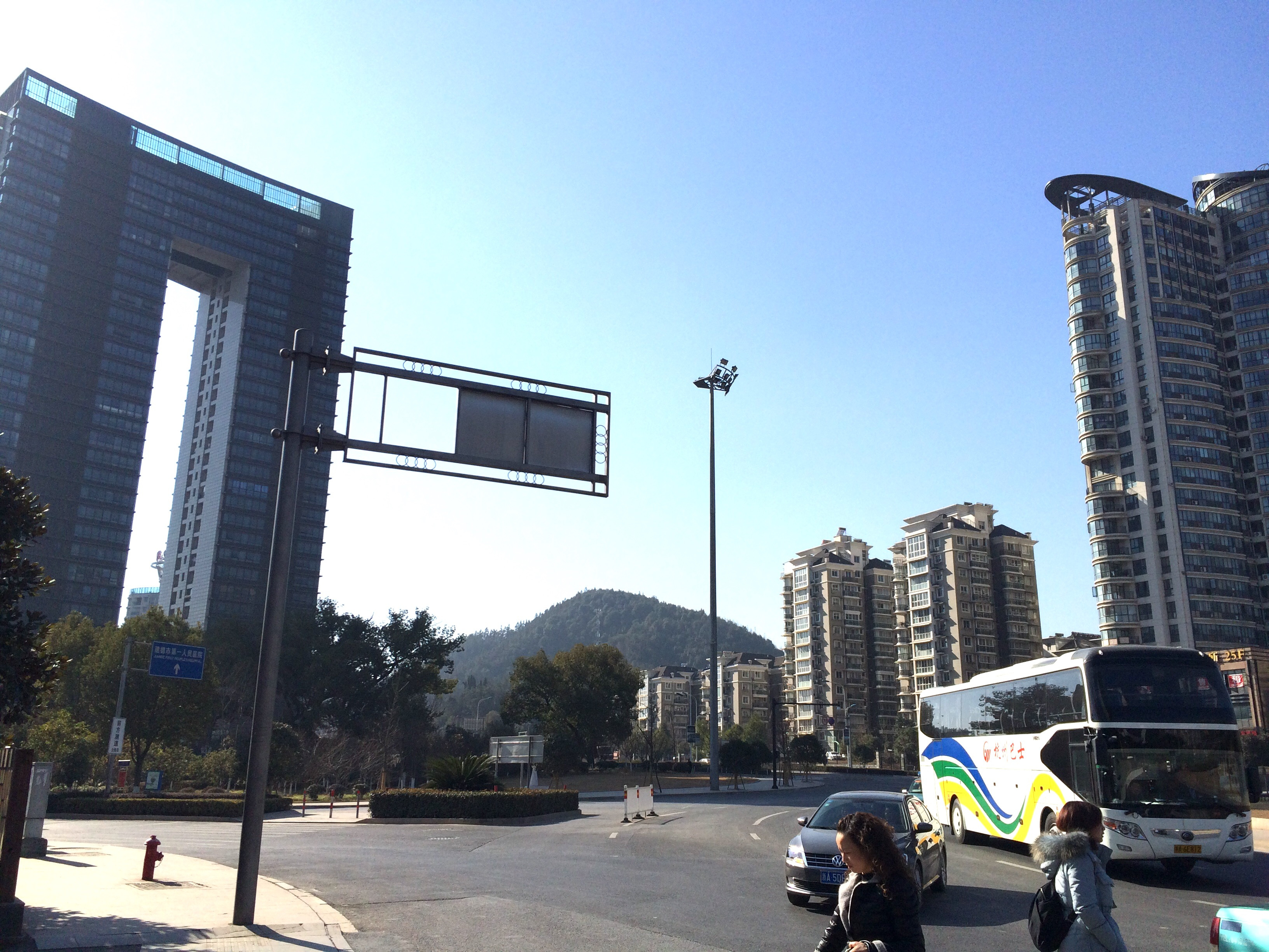 中文（中国大陆）: 新安江街道东入城口